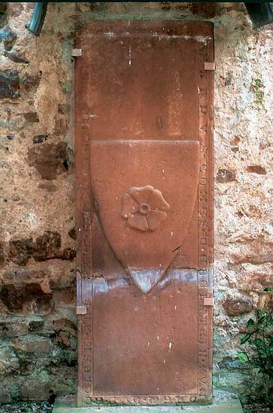 Grabplatte Eberhard von Eberstein im Kloster Rosenthal, Pfalz